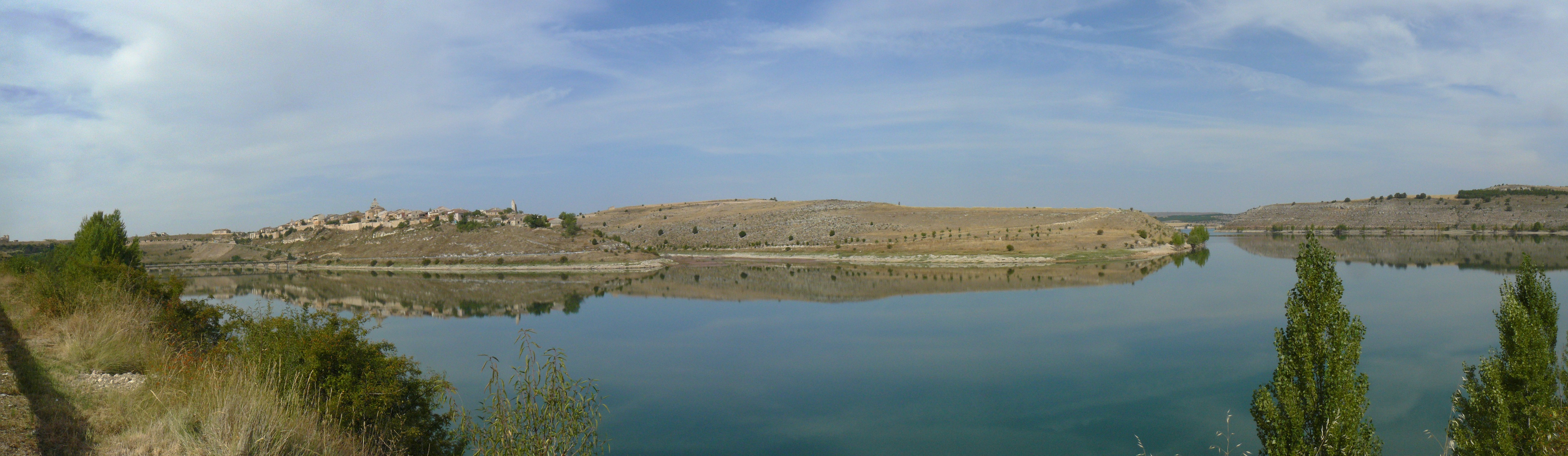 Vista del Embalse de Linares con Maderuelo.